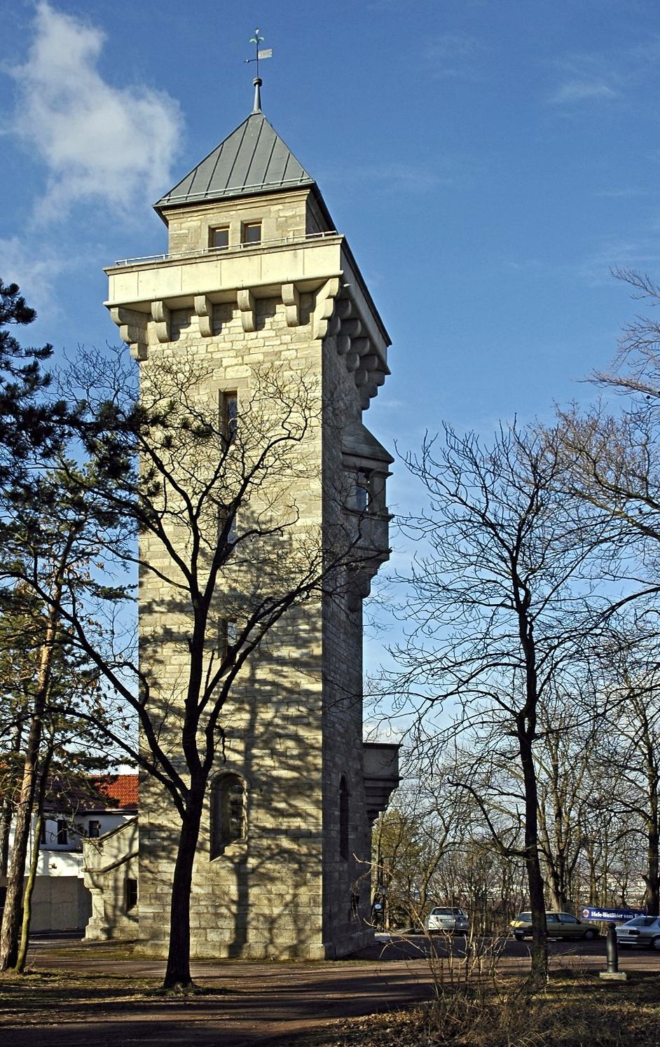 Alteburg-Turm bei Arnstadt, Thüringen